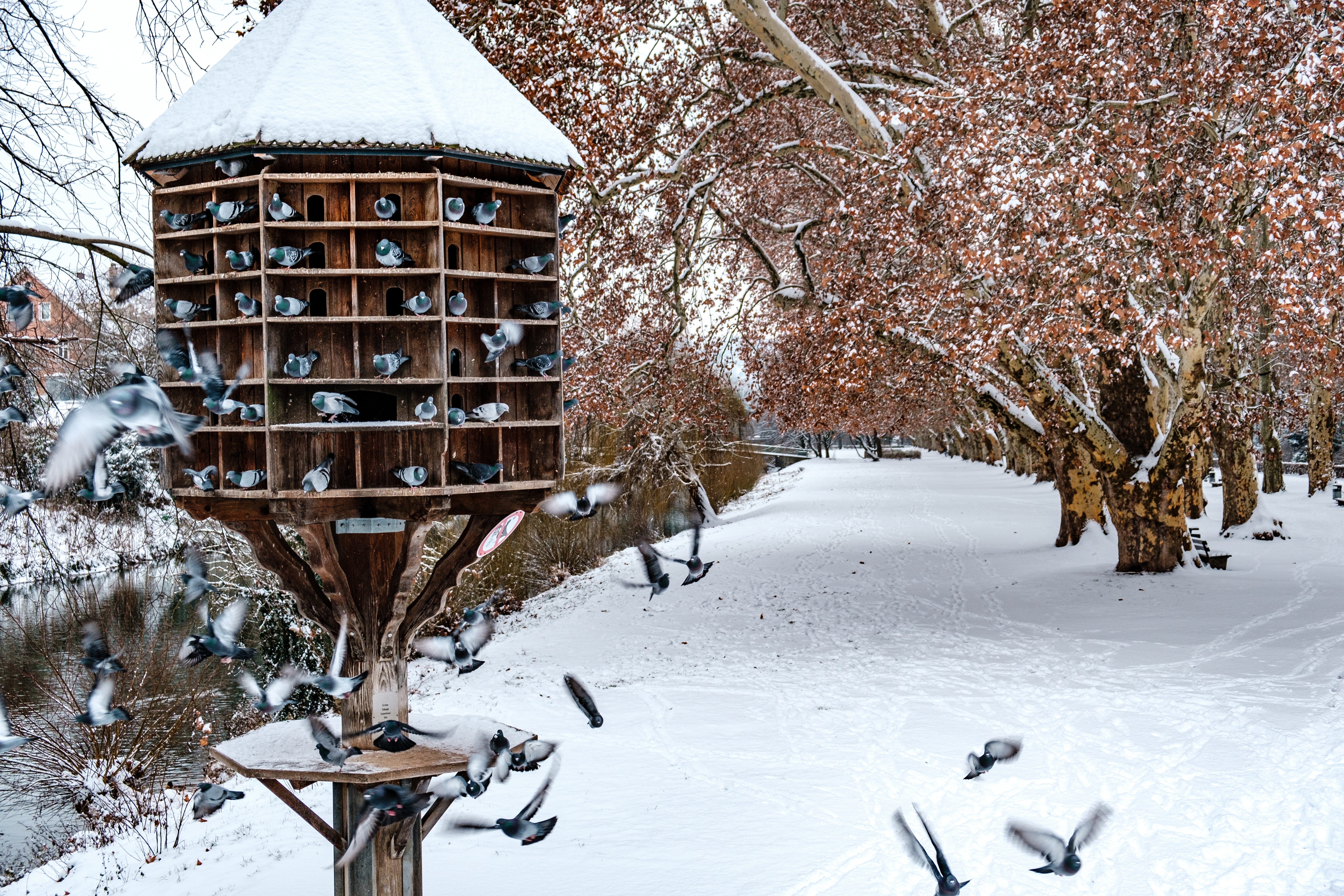 Taubenturm in Tübingen mit Schnee